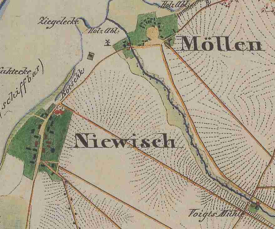 Ortsteil Niewisch, Stadt Friedland, Landkreis Oder-Spree, Brandenburg, Deutschland, Ausschnitt aus dem Urmesstischblatt 3951 Trebatsch von 1846